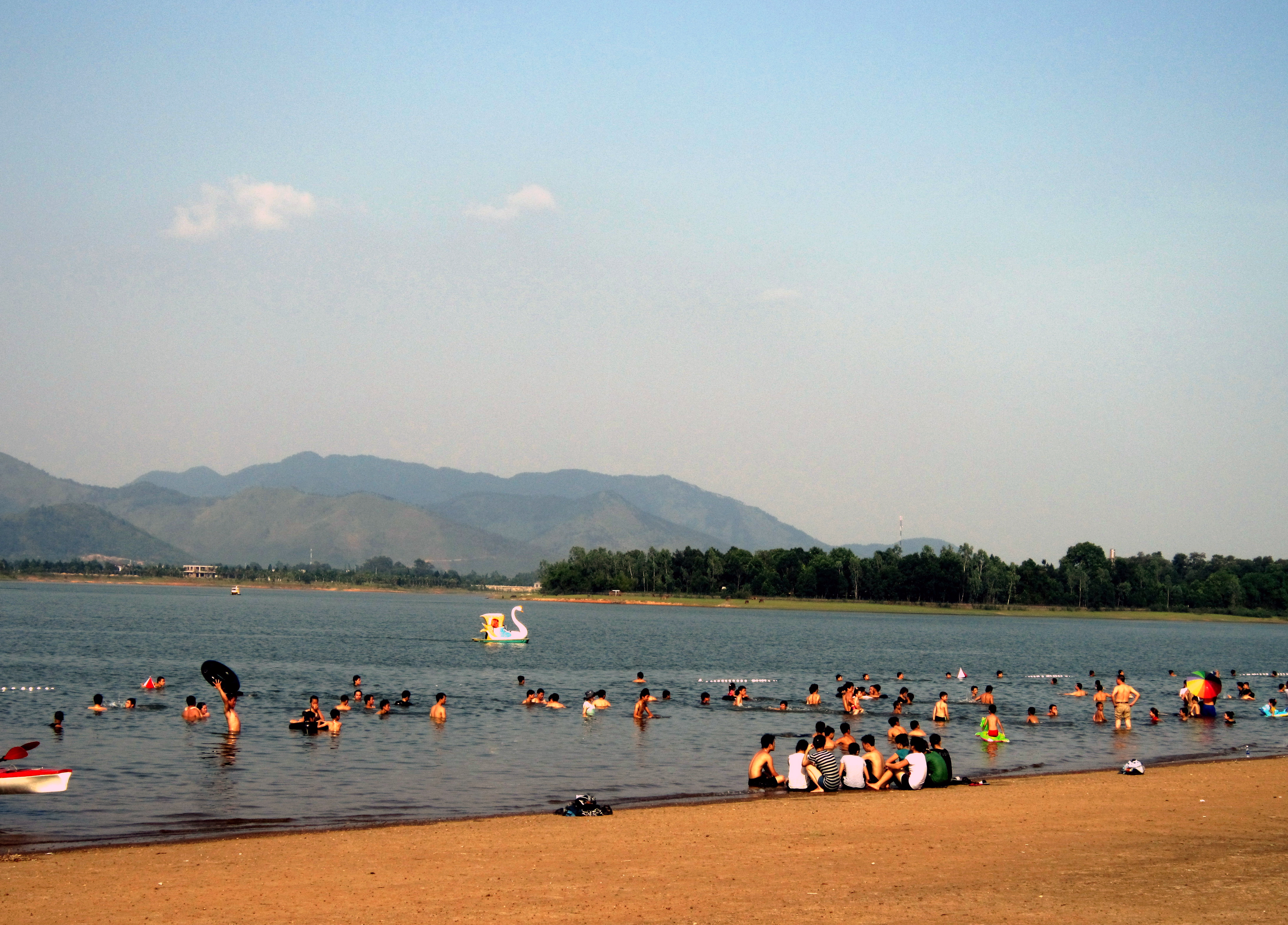 Bãi tắm tại hồ Đại Lải, thuộc tỉnh Vỉnh Phúc, Việt Nam.